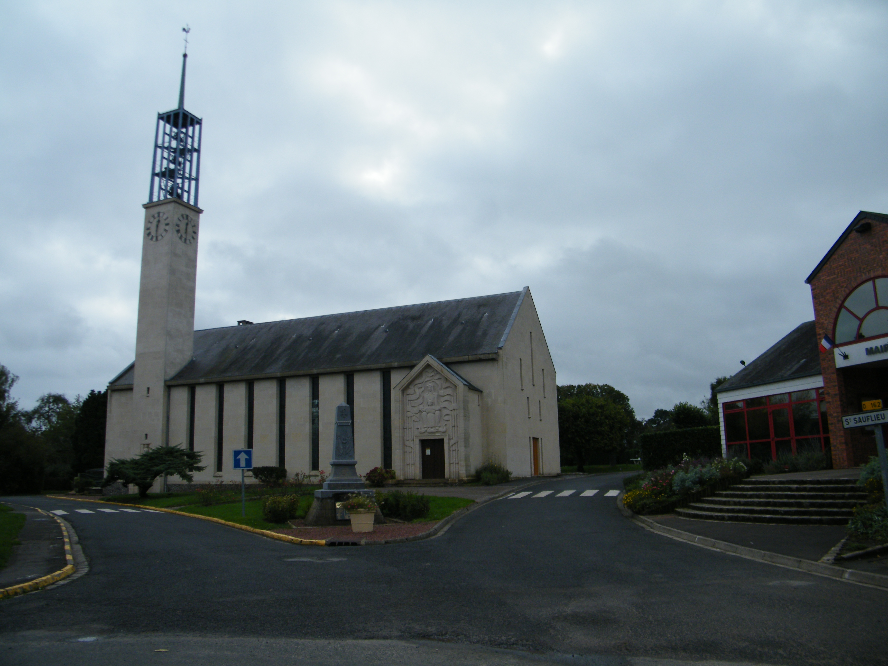 église.